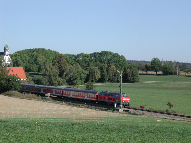 Kleberexpress bei der Einfahrt in den Bahnhof Löffingen